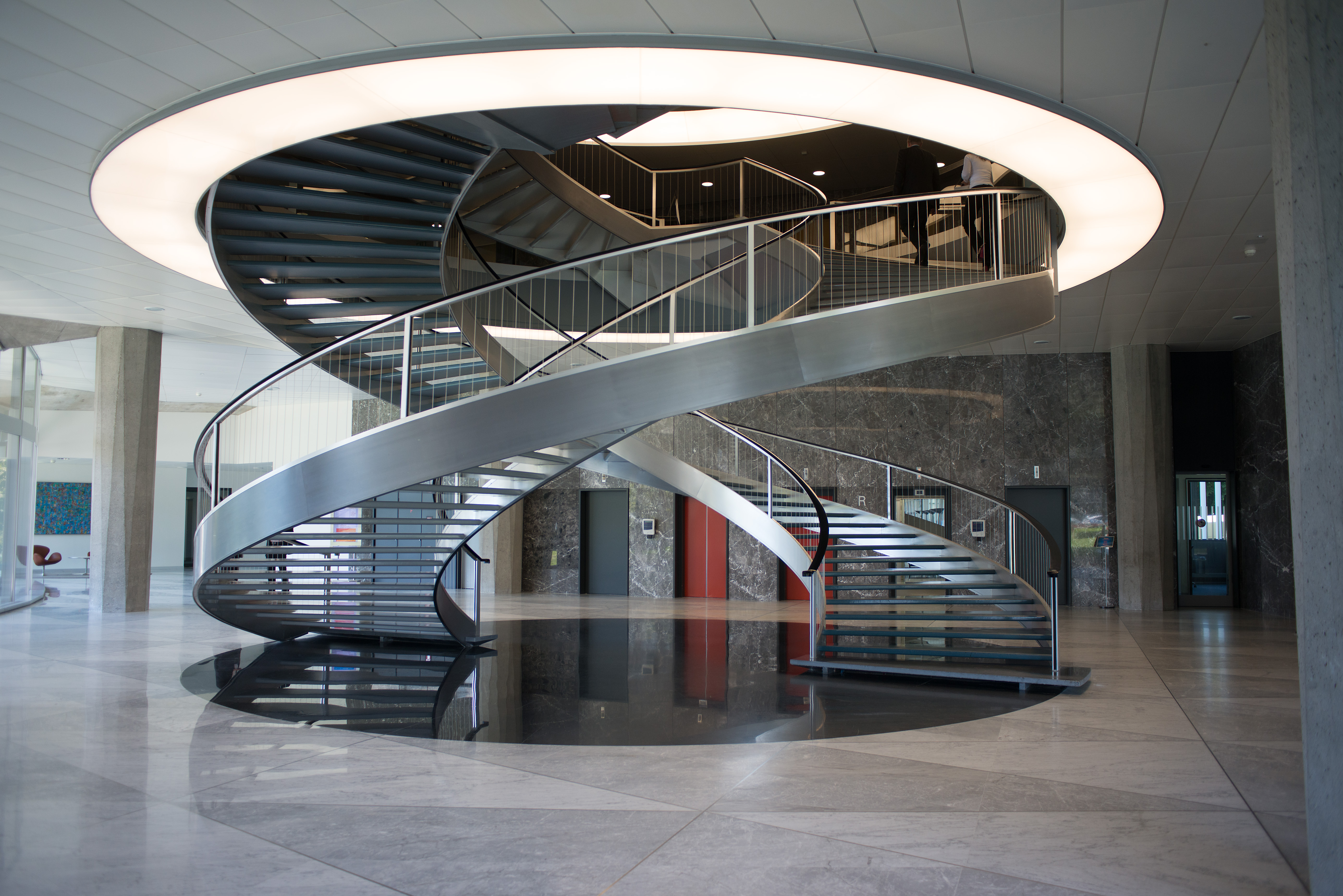 Stairs in Nestlé Headquarters, Vevey, CH